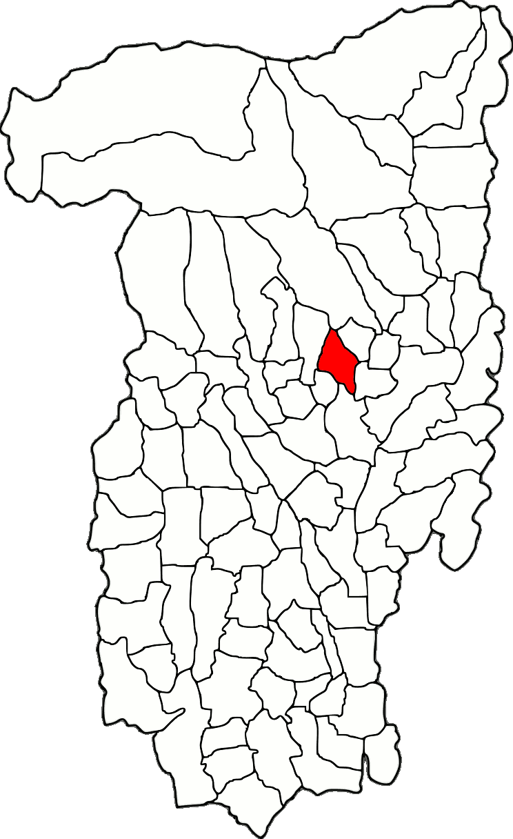 Lage der Gemeinde Bunești im Kreis Vâlcea (RO).